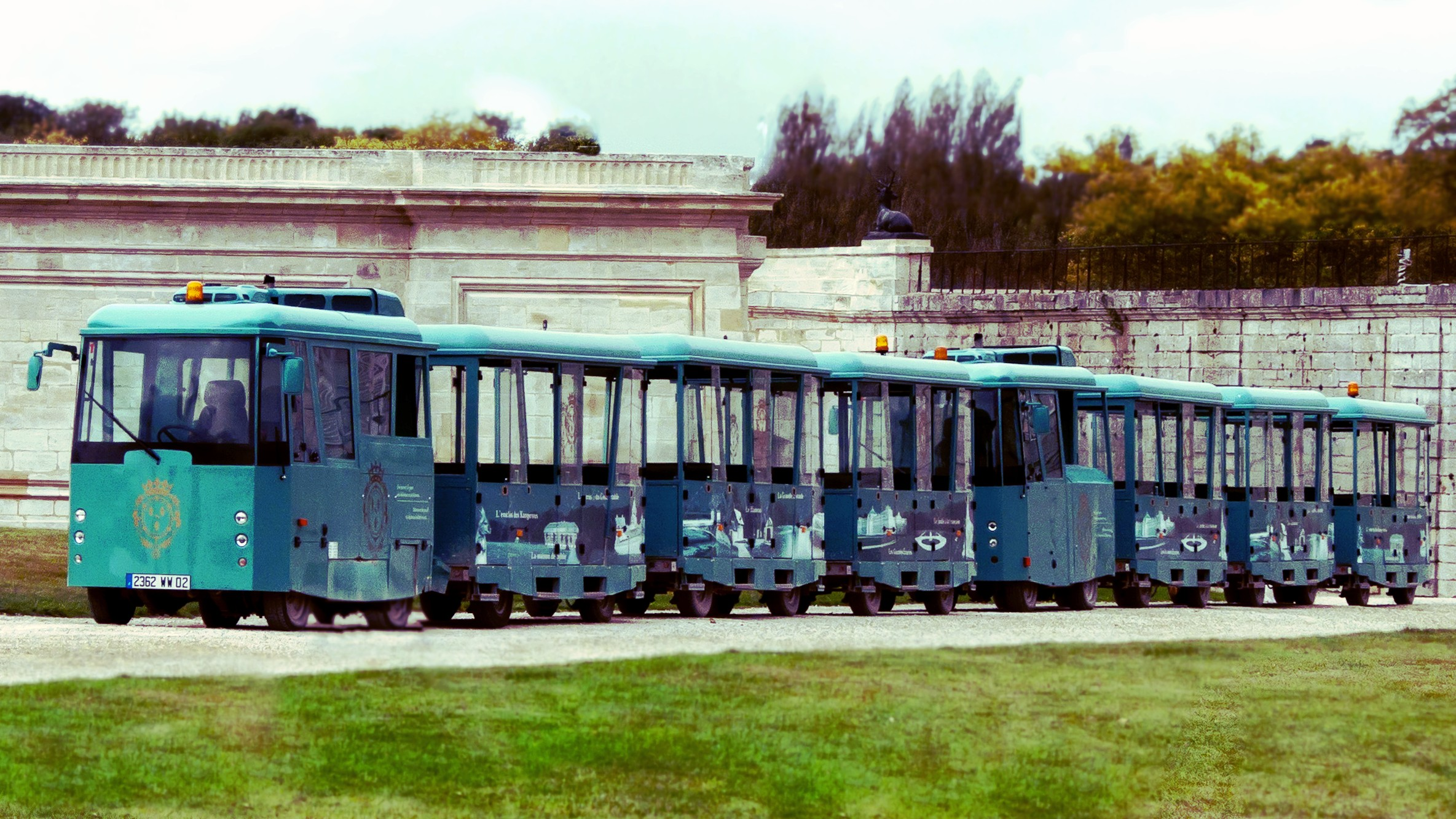 Deux petits trains routiers touristiques, chacun à trois remorques, dans le parc du Château de Chantilly, Oise, France. Plaque d'immatriculation provisoire : 2362 WW 02.